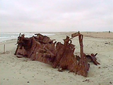 Schiffswrack an der Skelettküste, Namibia 1998. Selbst fotografiert, gemeinfrei. Fotograf: Robert Raderschatt